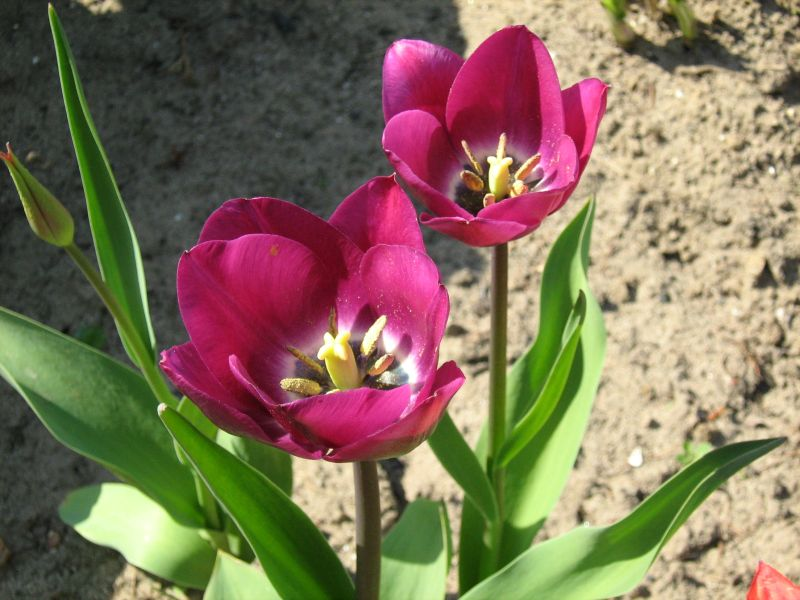 Tulipan